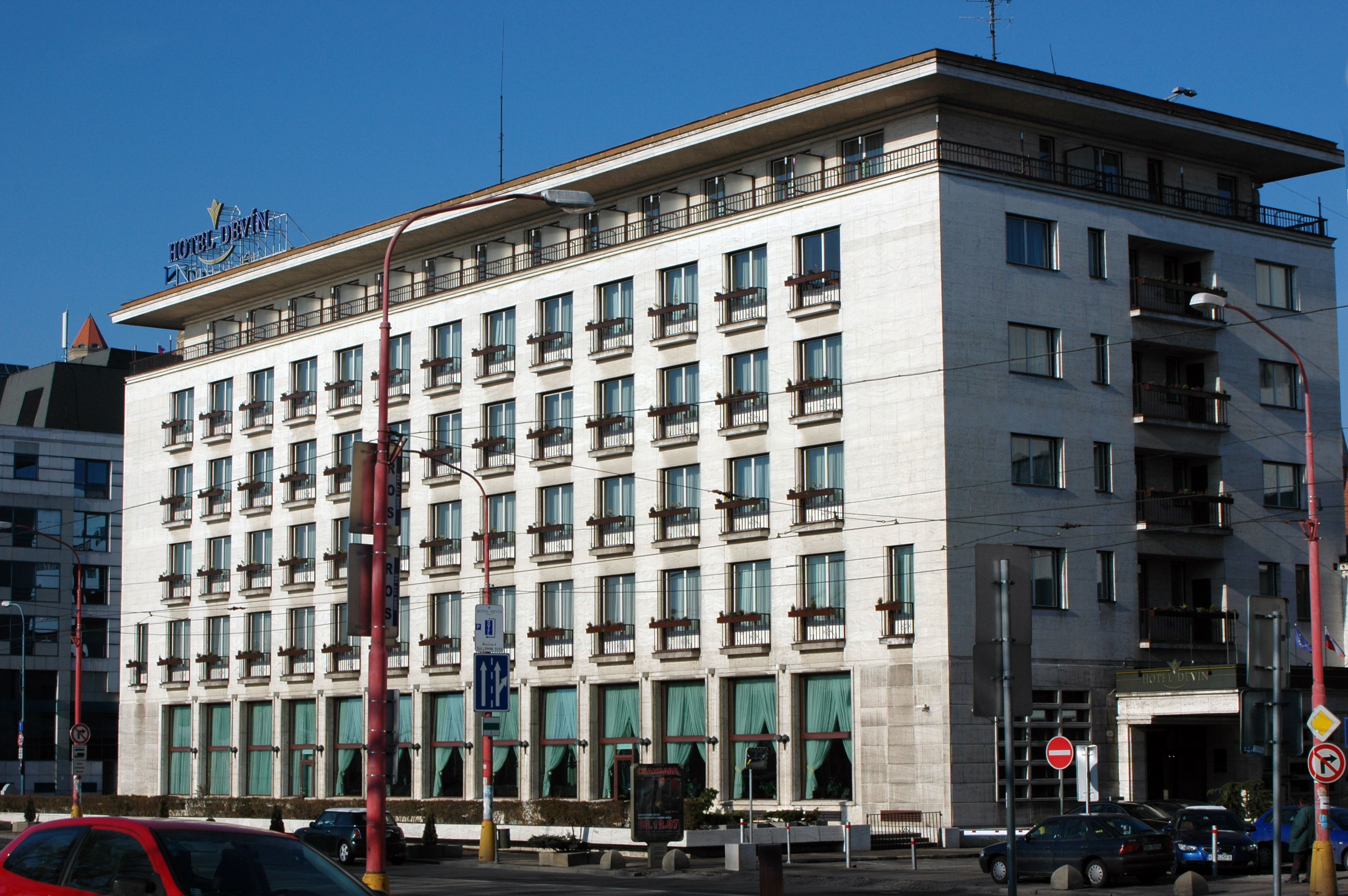 hotel devin nratislava bellus